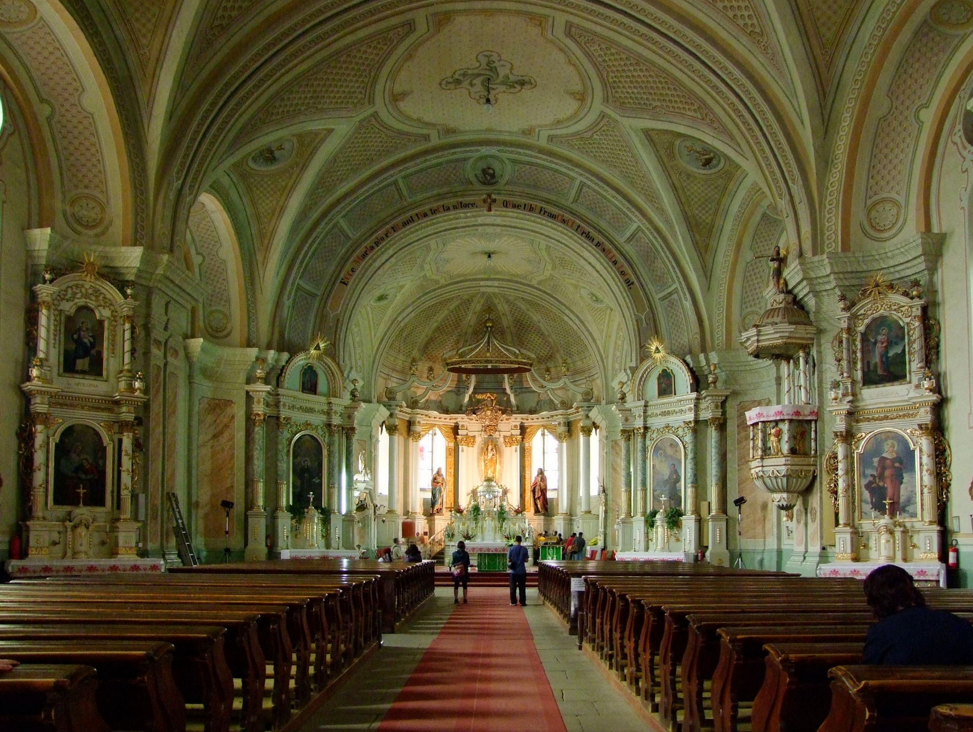 A csíksomlyói kegytemplom és kolostor belseje